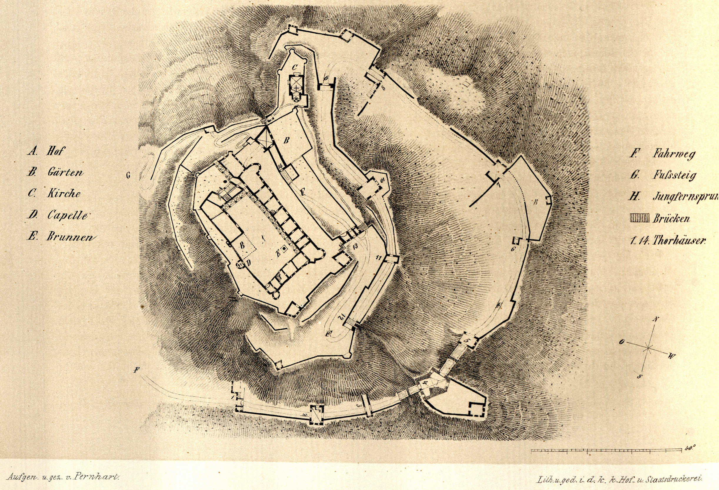 Holzschnitt aus den Mittheilungen der kaiserl. königl. Central-Commission zur Erforschung und Erhaltung der Baudenkmale Band 5, September 1860. Beitrag von Josef Edler von Scheiger mit dem Titel: „Hochosterwitz in Kärnthen“, S. 244-265 Druck: k. k. Hof- und Staatsdruckerei Zuordnung der Zeichnungen entsprechend dem Dateinamen